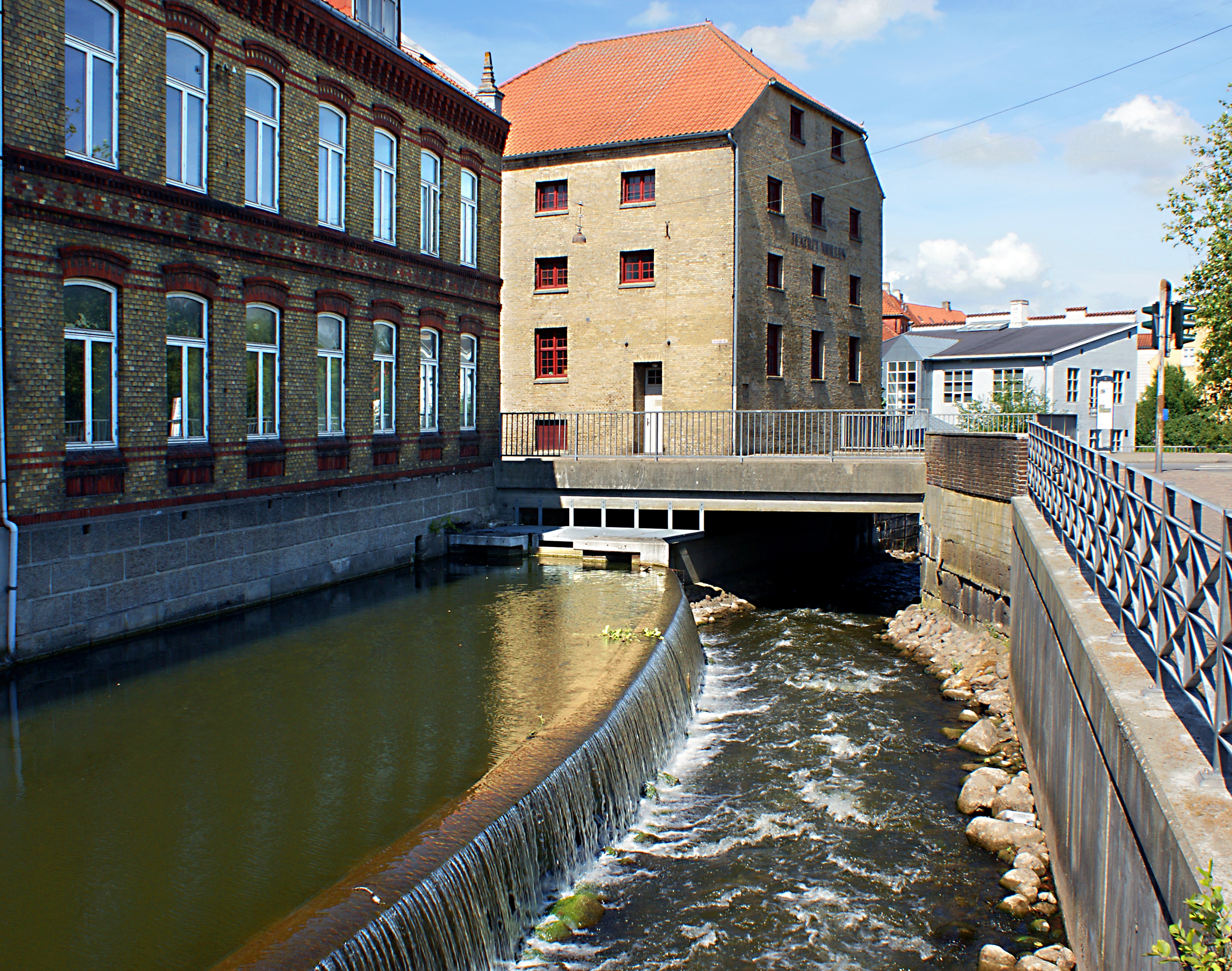 Slotsvandmøllen ved møllestrøm og møllestryget i Haderslev